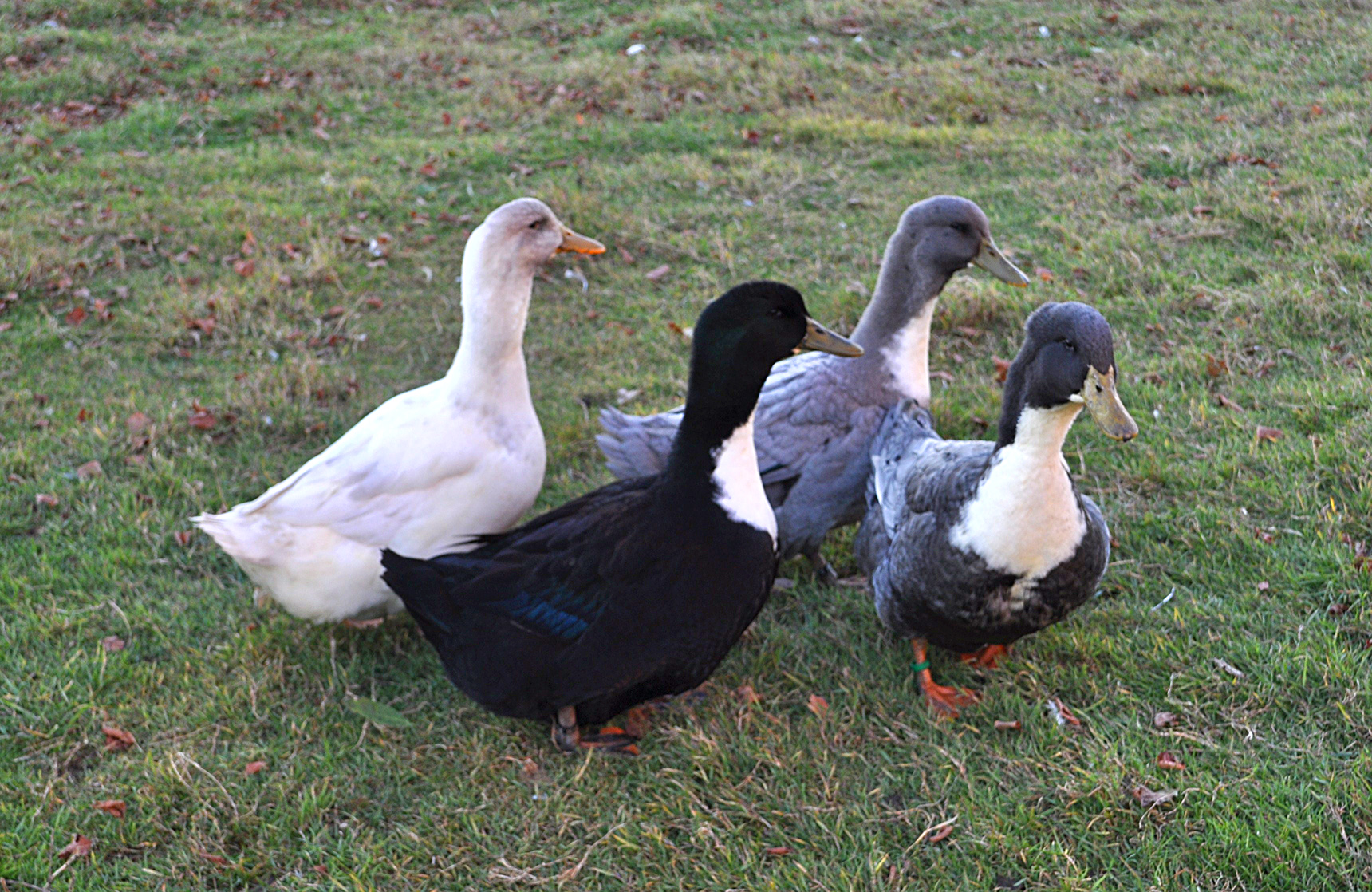 Pärlgrå anka, svart anka, blå anka och blå andrik.